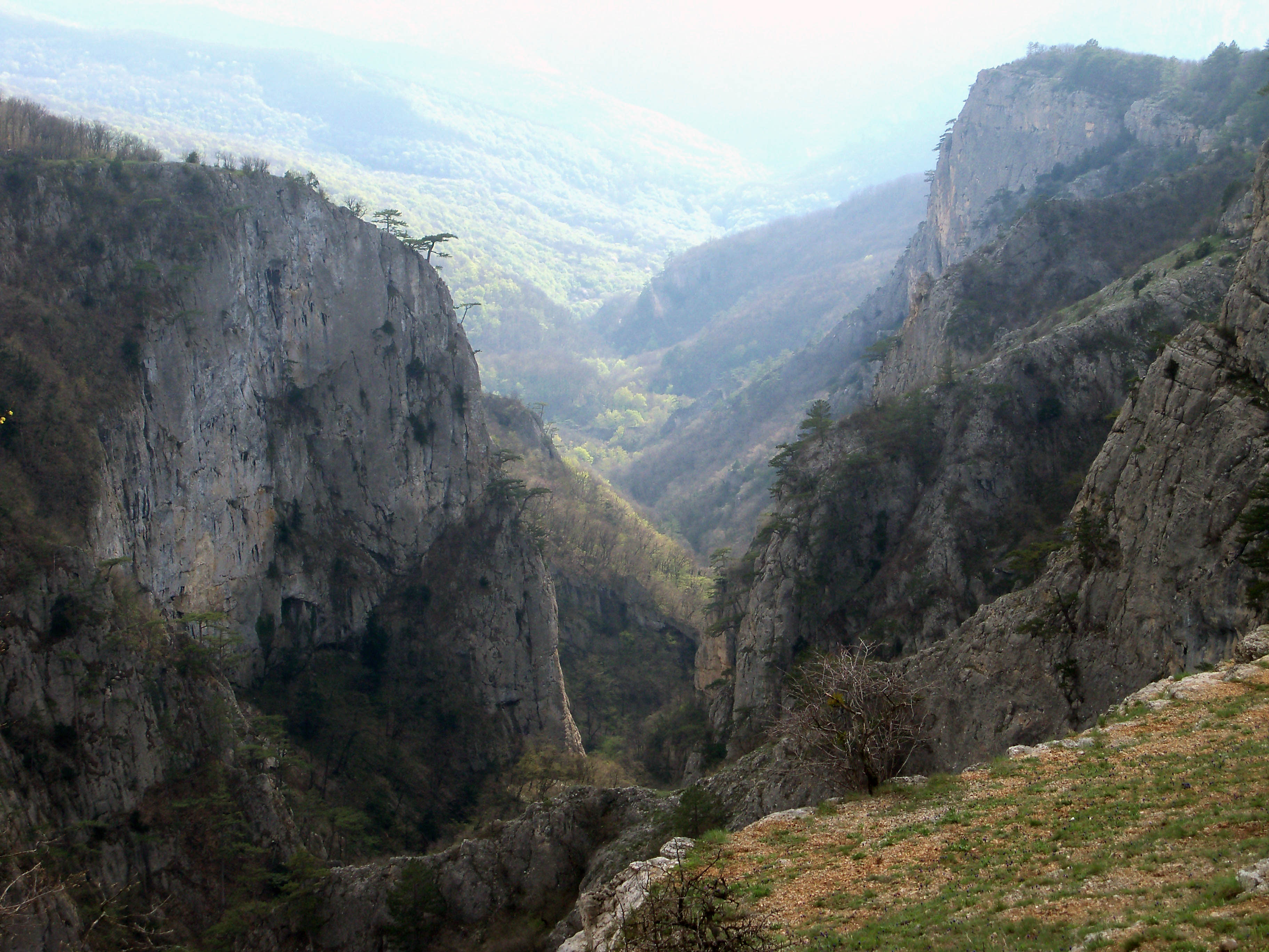 Великий каньон Криму